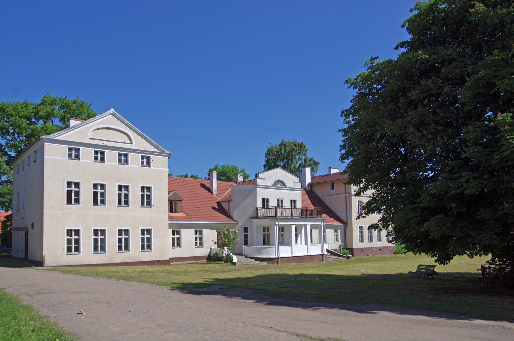 Dwór w Gdyni-Kolibkach (zespół dworsko-krajobrazowy)